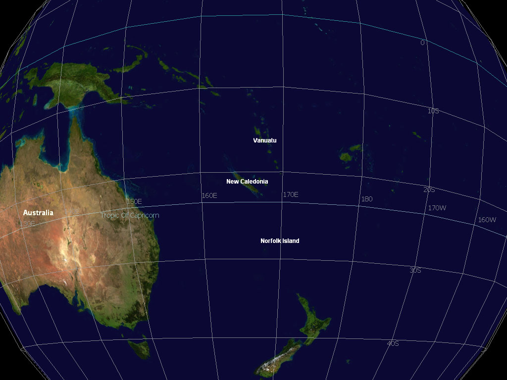 Neukaledonien in einer virtuellen Ansicht aus "NASA World Wind". März 2006